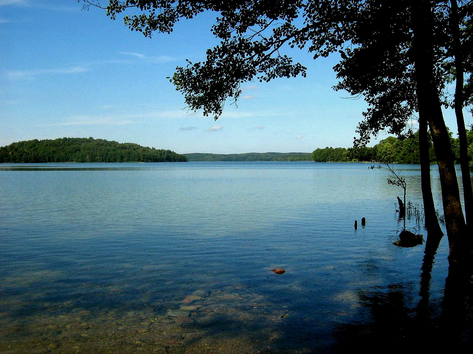 Jezioro Hańcza, widok na północ